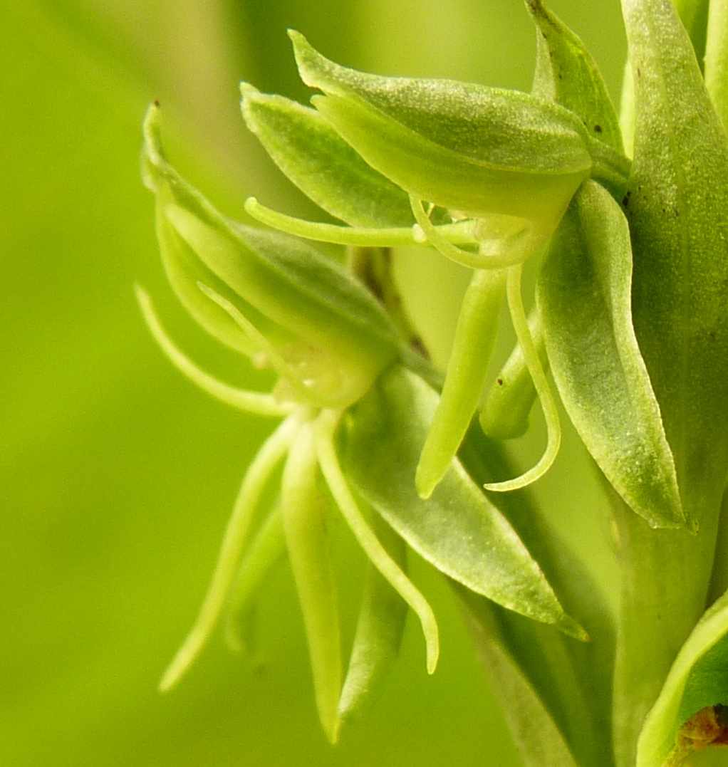 Planta de pantano cercano a lago Ranco, lugar tipo de Habenaria paucifolia referido por Lindley en monografia: Donada por Diego Penneckamp